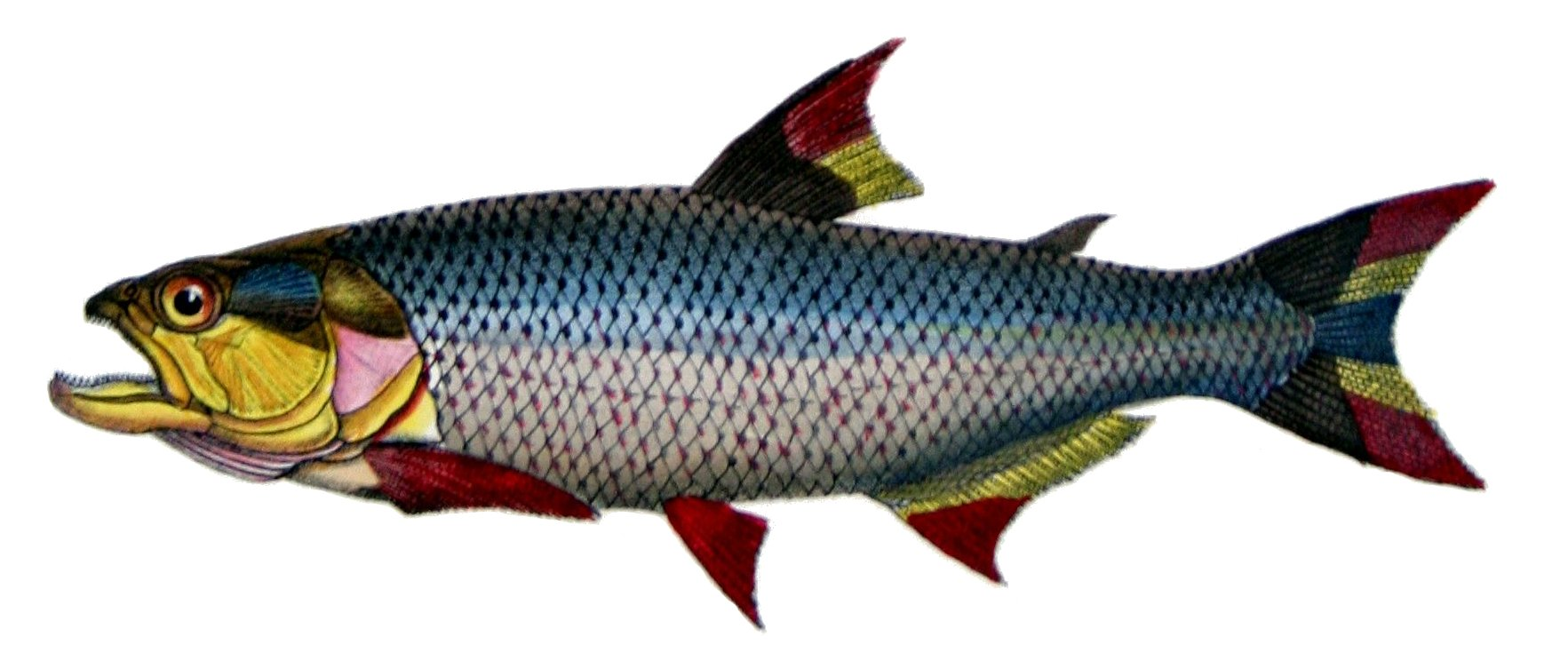 Salminus hilarii Cuv. Val. = Salminus hilarii Valenciennes, 1850